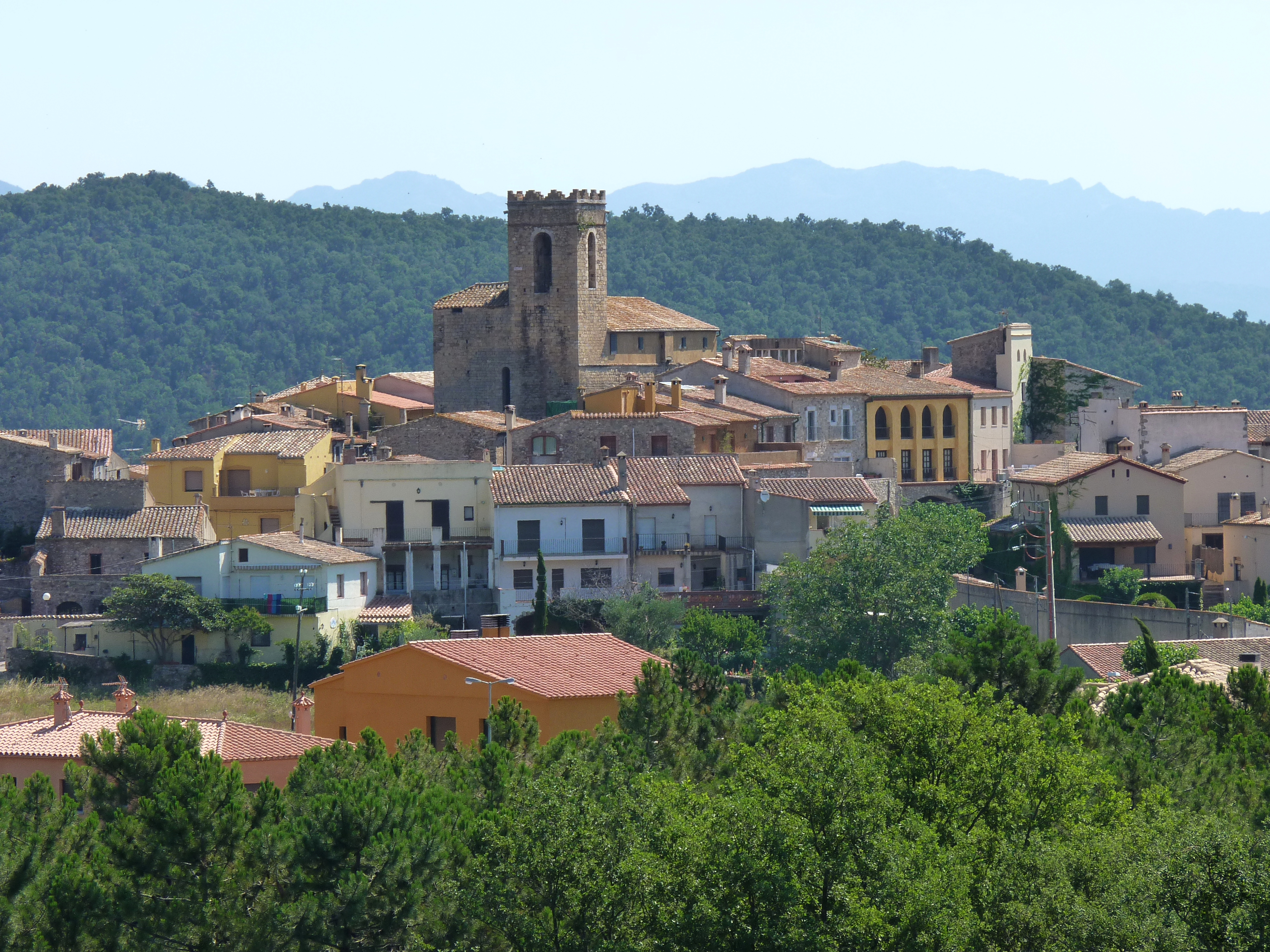 Vue générale et église Sainte-Marie, Darnius (Haut-Ampurdan, Gérone, Catalogne, Espagne)